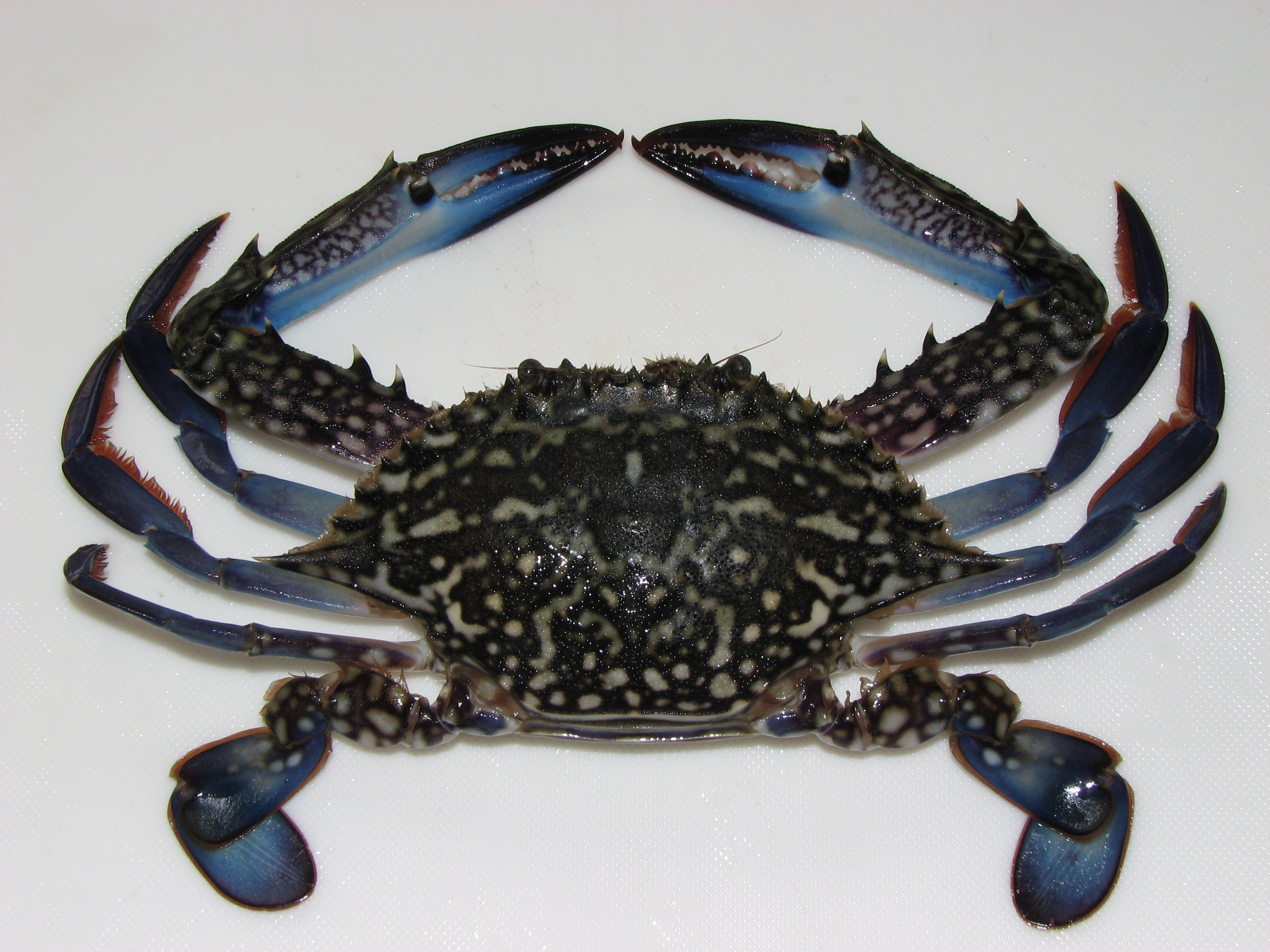 タイワンガザミ(雄個体・背面；Portunus pelagicus),千葉県富津市産、甲幅10cm